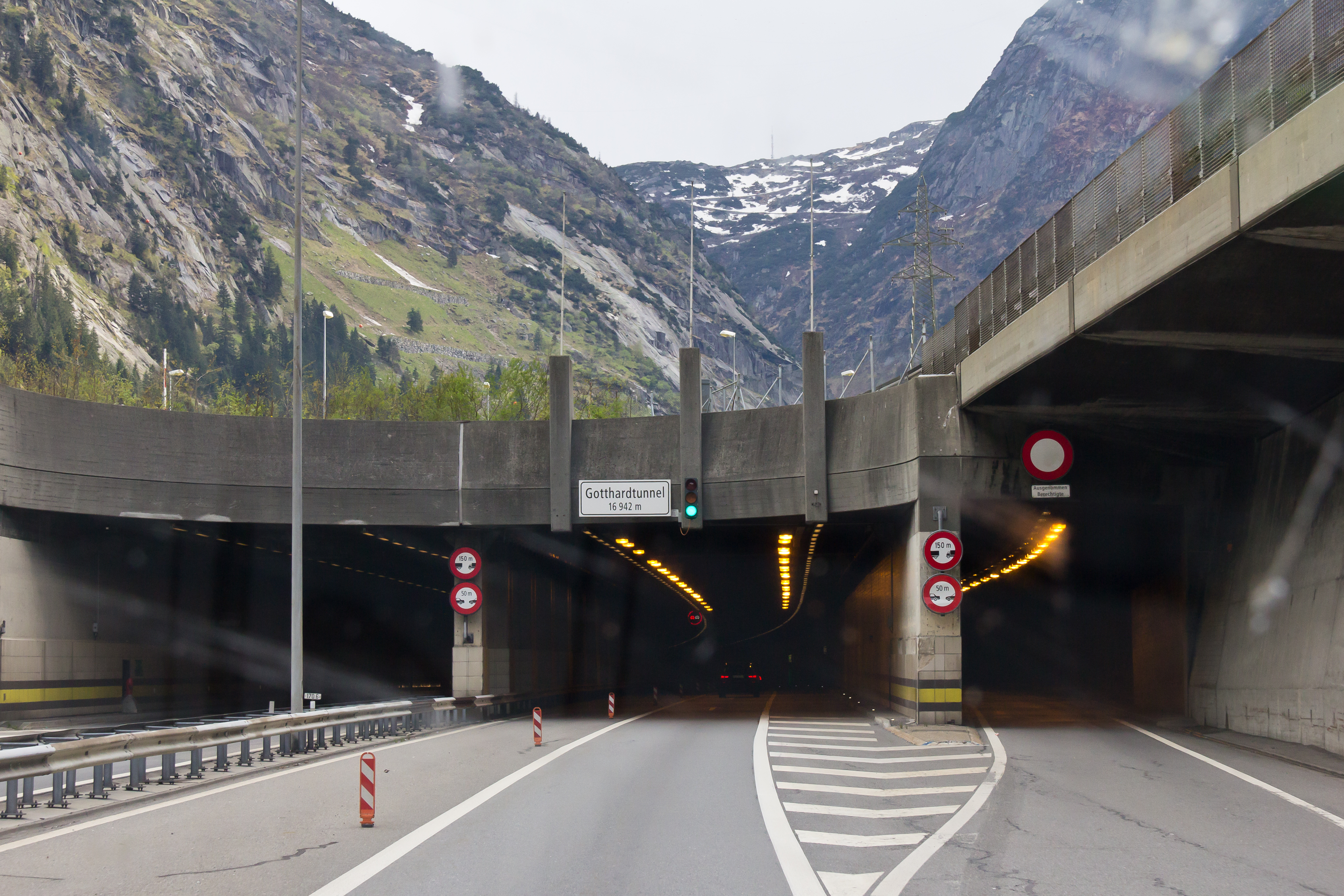 Gotthard-Strassentunnel in einer Nord-Süd-Befahrung Foto: nördliche Tunneleinfahrt